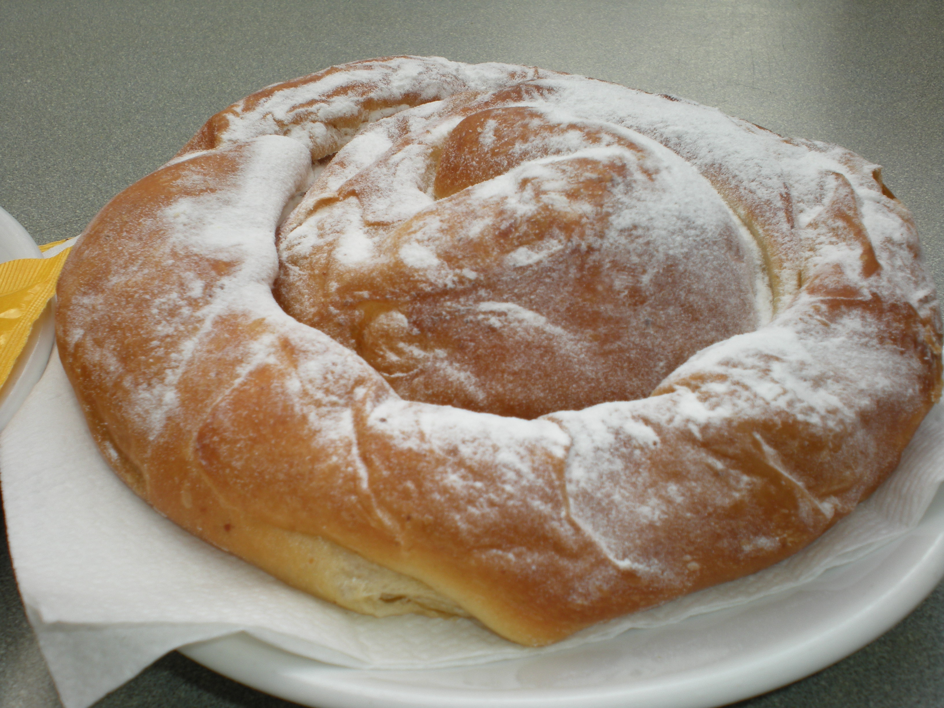 Una ensaimada.